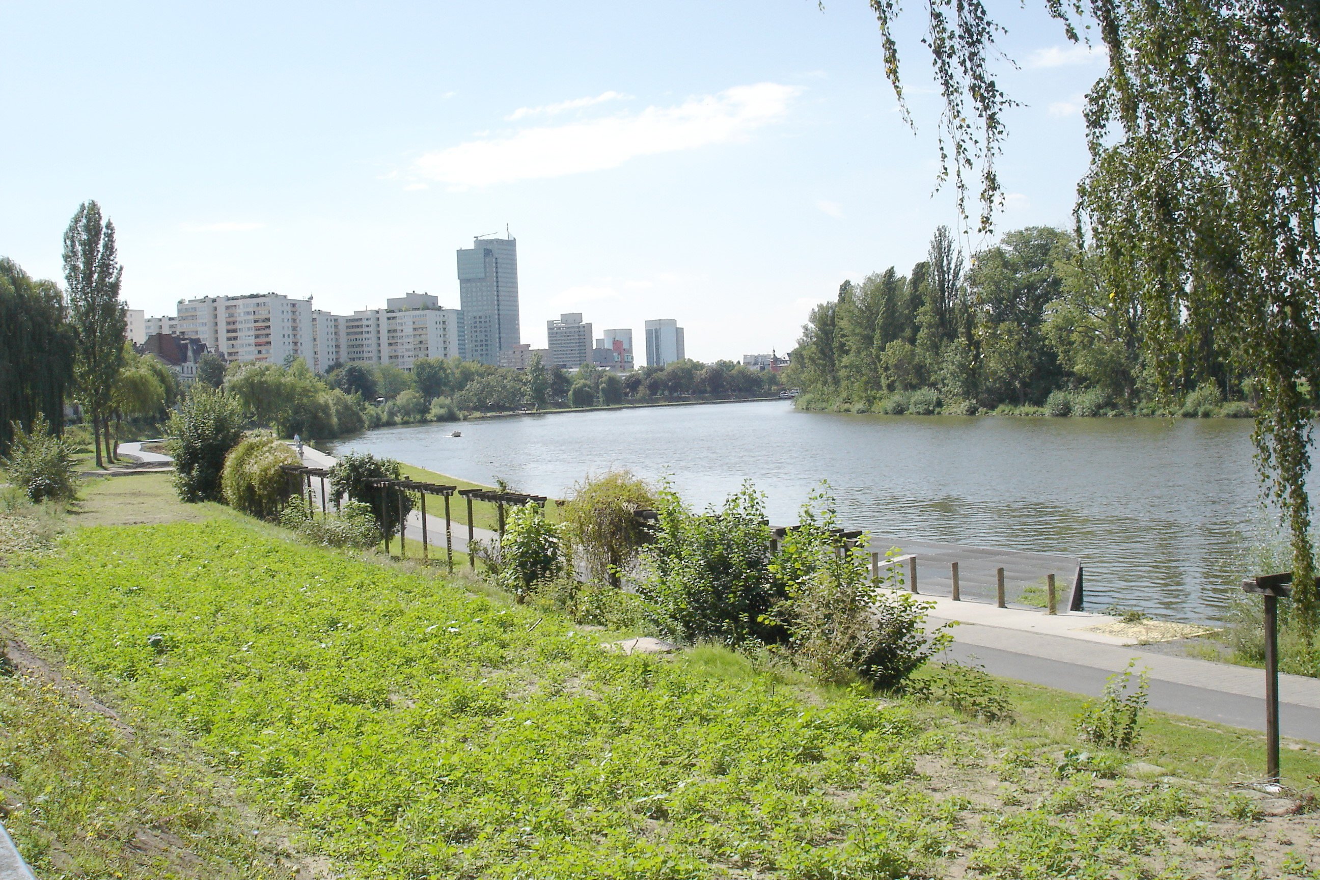 Mainbogen in Offenbach, flussabwärts